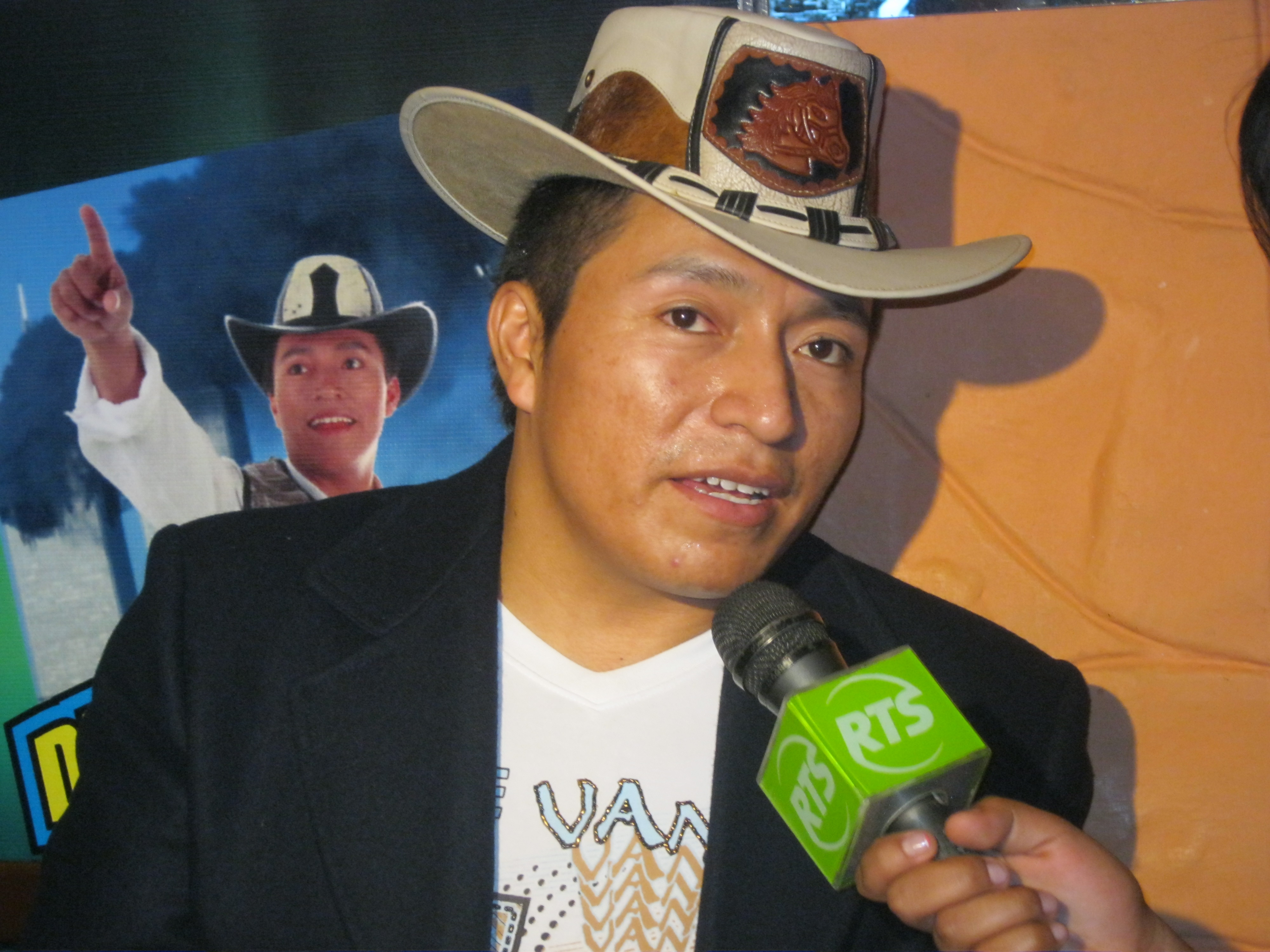 Delfín Quishpe en una cevichería de Guayaquil, en las calles Pedro Moncayo y 9 de Octubre, el 13 de septiembre de 2012, entrevistado por una reportera de farándula de RTS.